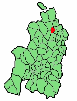 aipaturiko udalerriaren kokapena Nafarroa Beherean